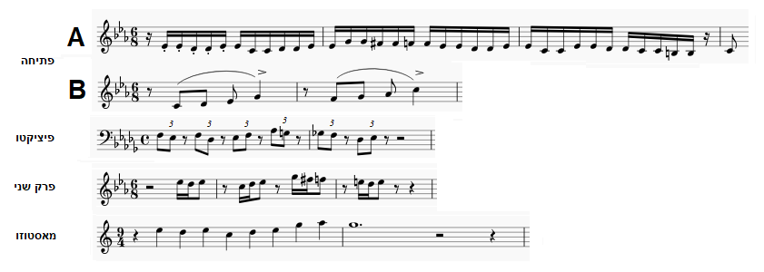 הסימפוניה מס' 3 ('לעוגב') של קאמי סן-סנס